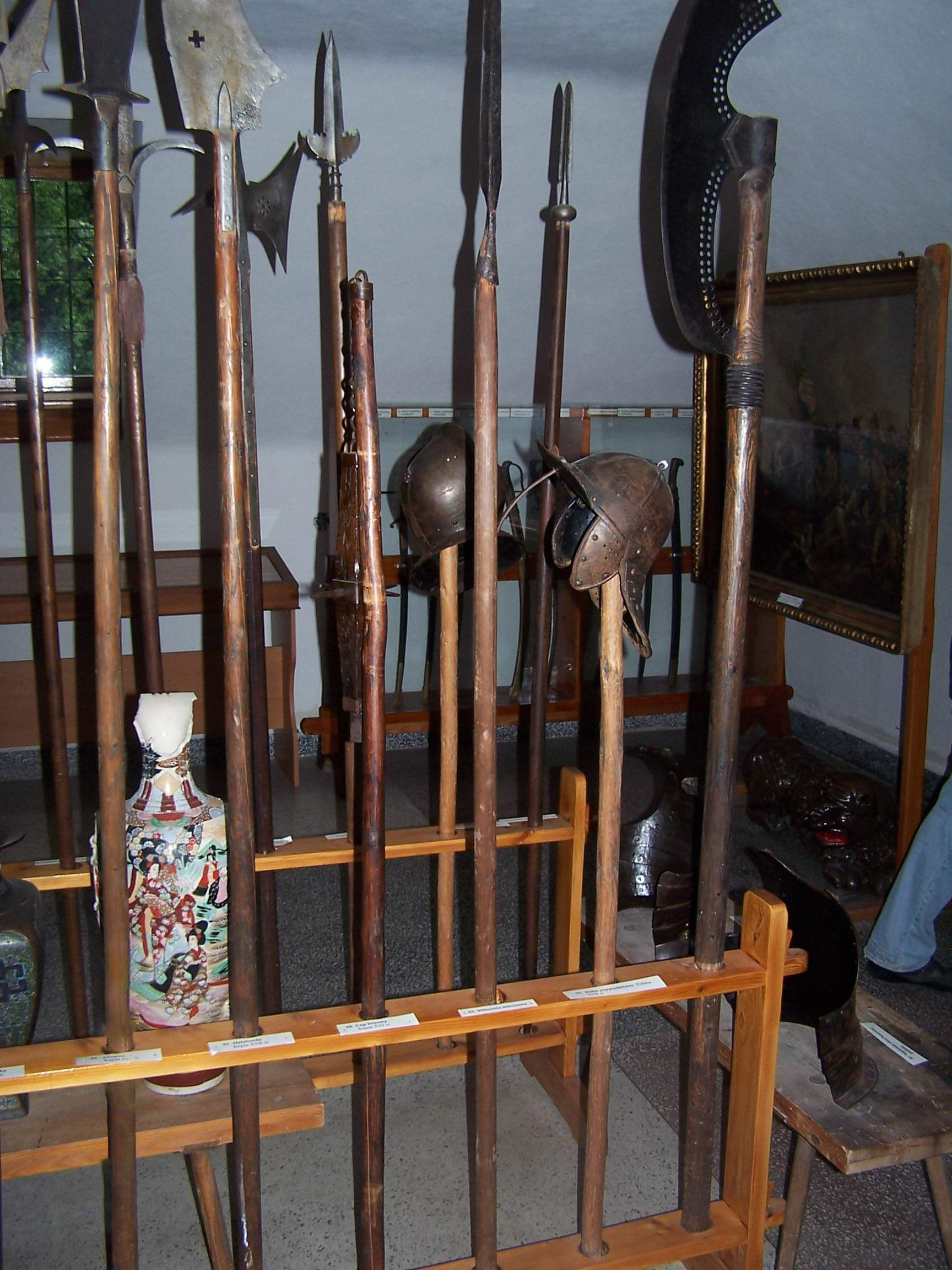 Photo by Piotrus. Pole weapons and other items in monastery in Szczyrzyc, Poland. Opactwo cystersów w Szczyrzycu